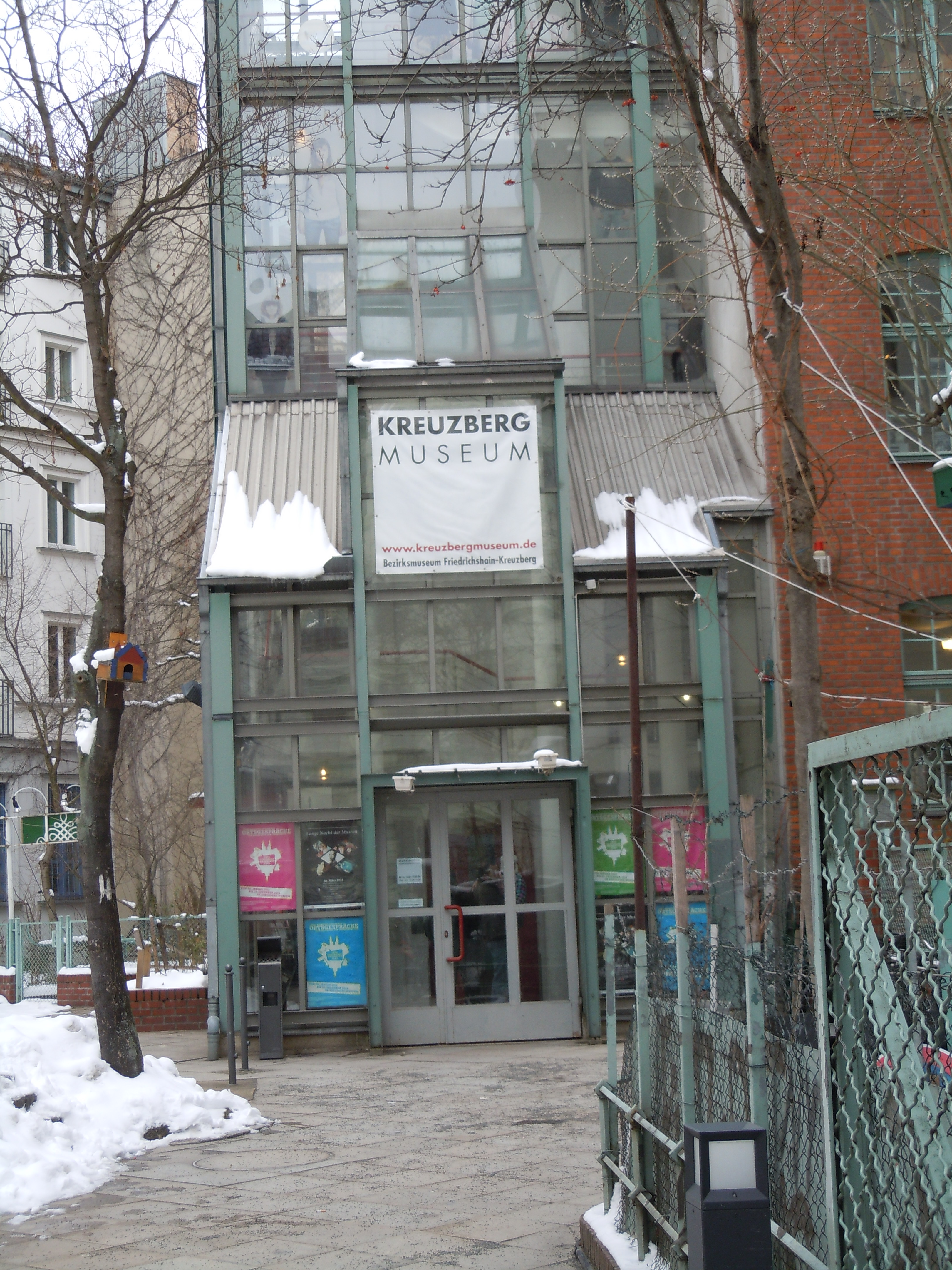 Bezirksmuseum Friedrichshain-Kreuzberg, Adalbertstraße, Berlin-Kreuzberg, Außenansicht